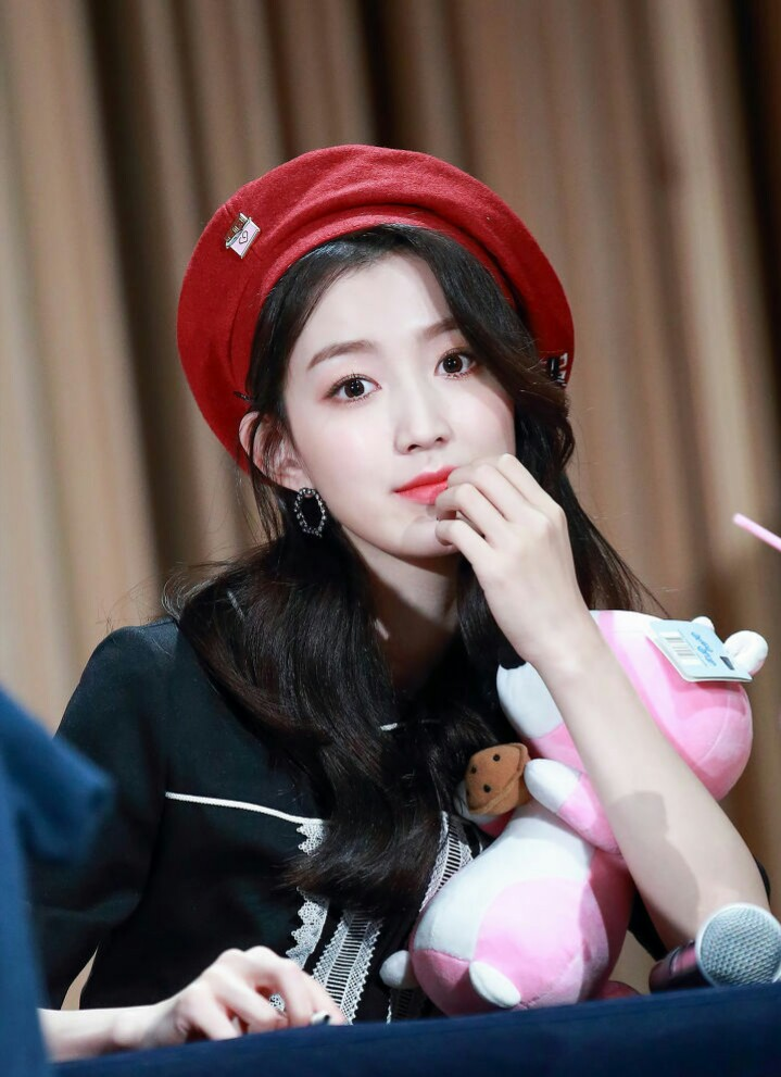 171117 구구단 하나 영등포 팬사인회